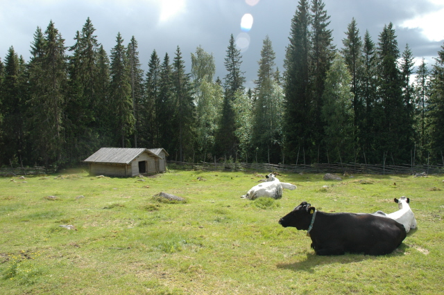 Kossor Ransbysetern; Fjällkor på Ransbysätern